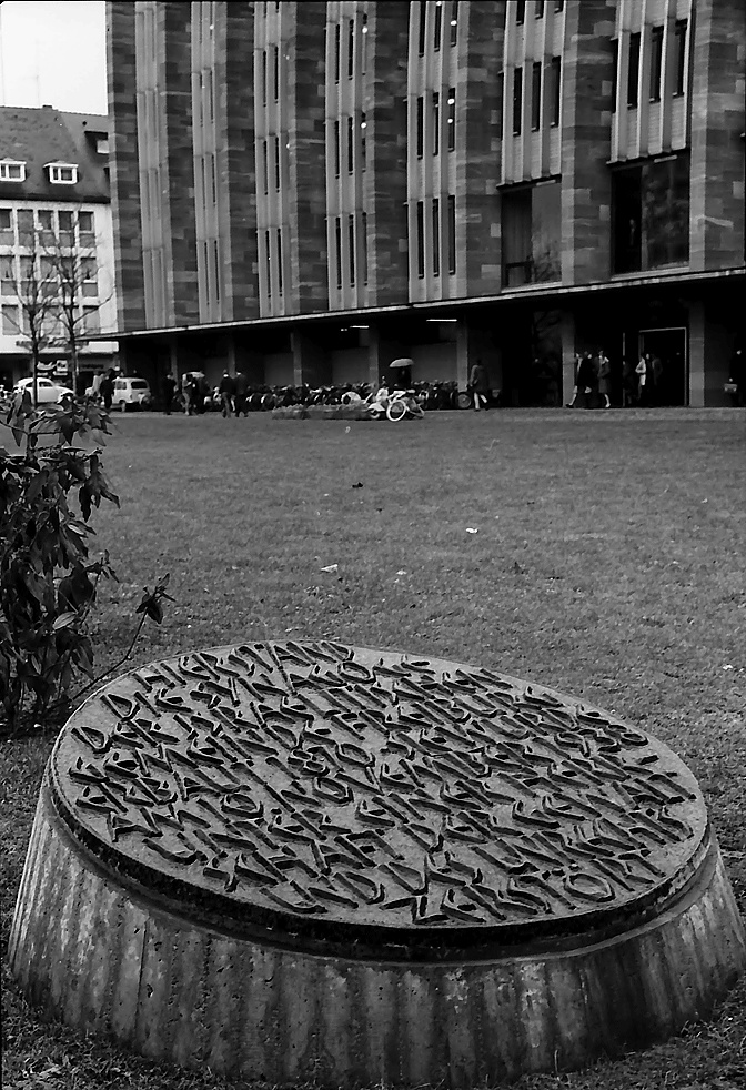 Freiburg i. Br.: Gedenktafel für die ehemalige Synagoge vor dem Kollegiengebäude II der Universität